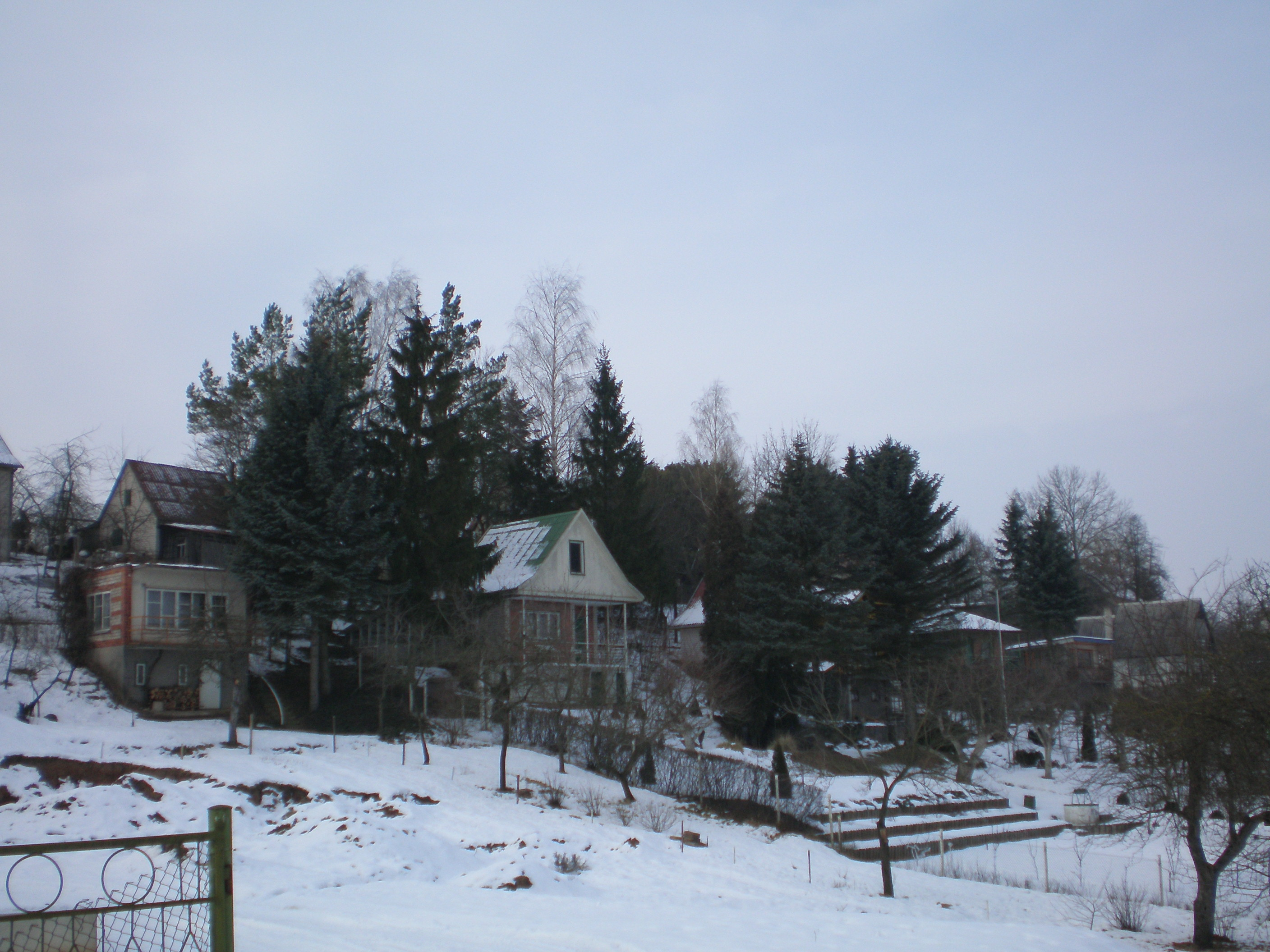 Justinava